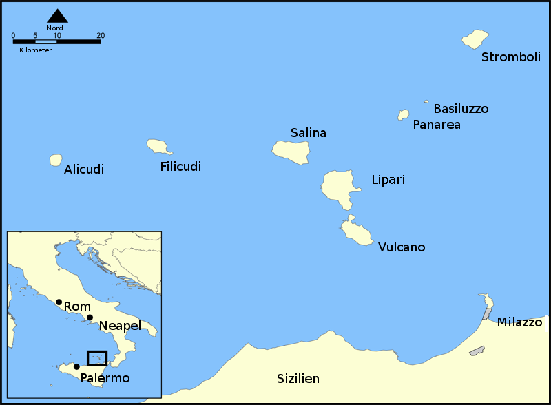 de: Liparische Inseln mit deutscher Beschriftung